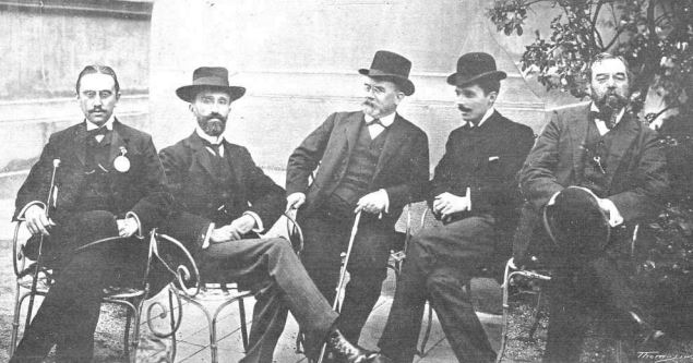 Comissió tècnica organitzadora del I Congrés Internacional de la Llengua Catalana (1906); des de l'esquerra, Jaume Algarra i Postius, Jaume Massó i Torrents, Antoni Rubió i Lluch, Joaquim Cases-Carbó